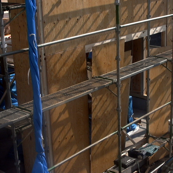 構造用合板_耐力壁_01